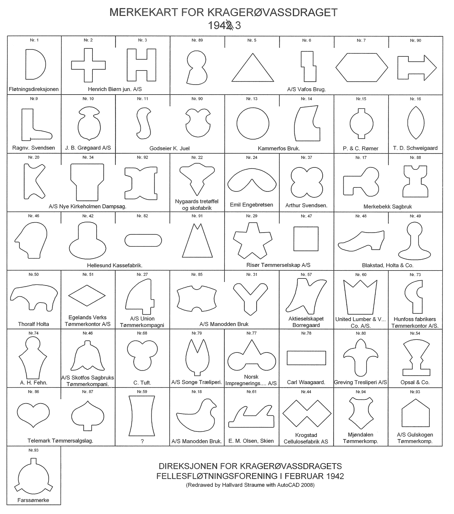 Tømmermerker brukt i Kragerøvassdraget 1942-43.